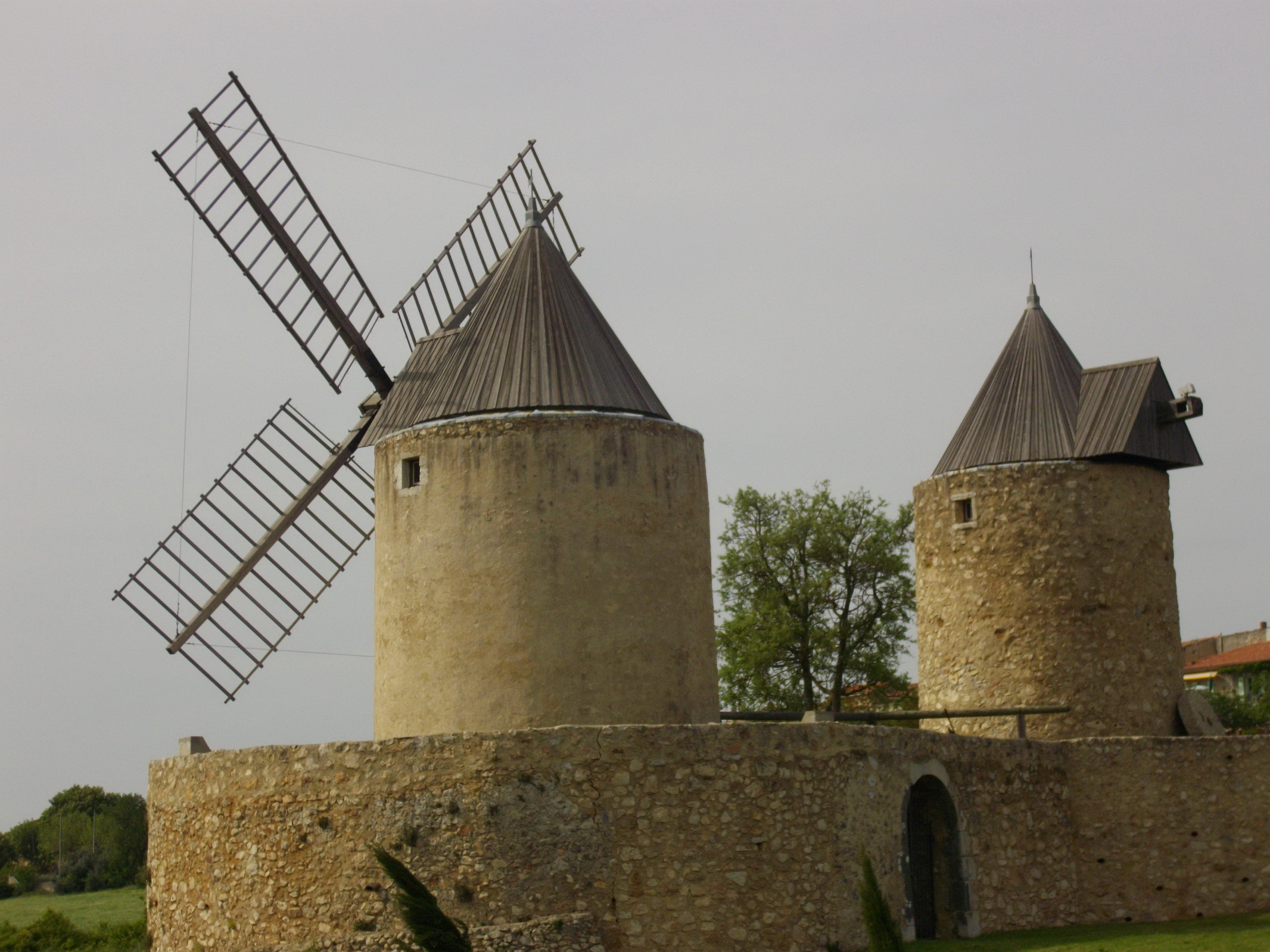 Moulins à farine : moulins à vent, avec leur soubassement en forme de tours .